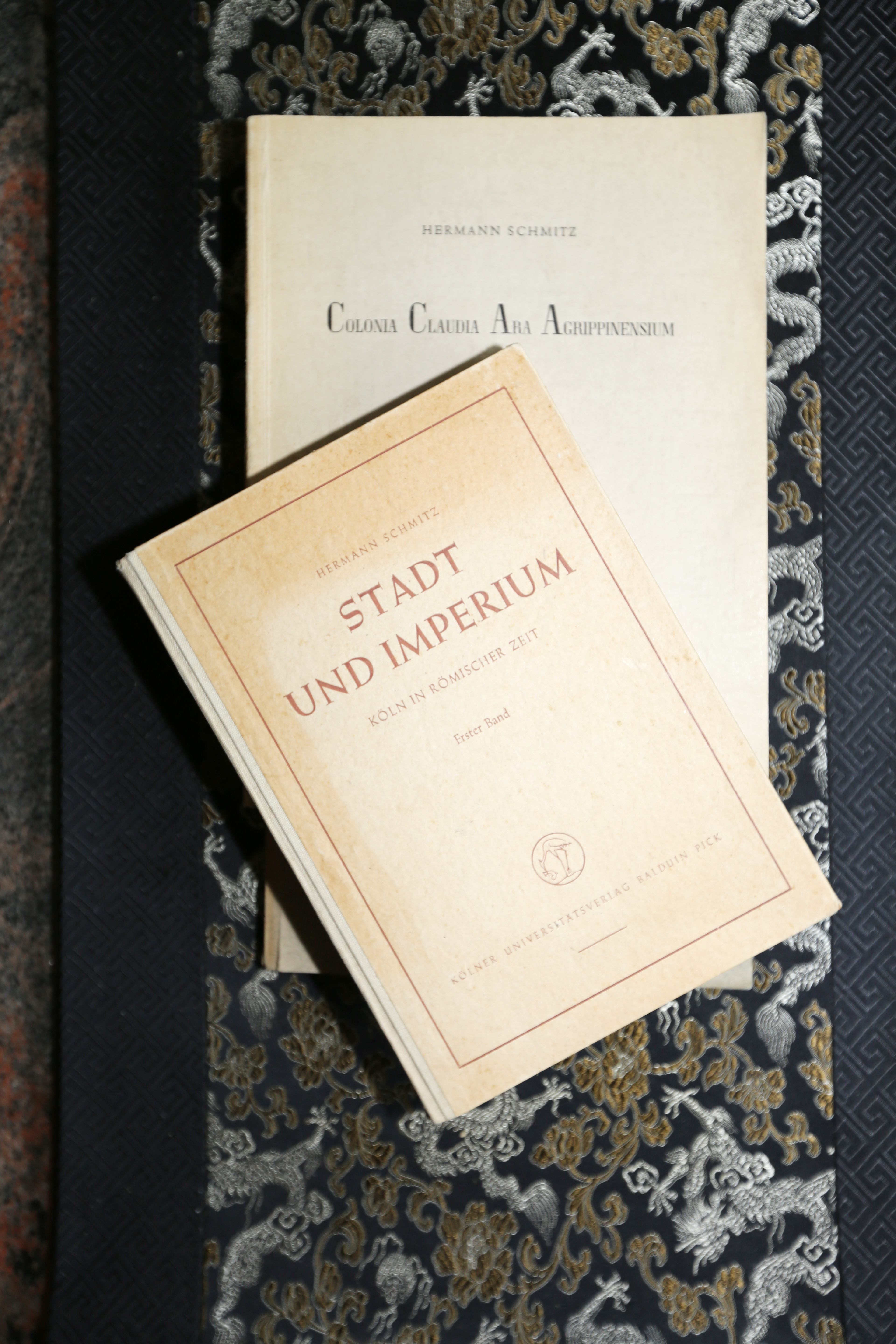 Illustration zum Artikel Hermann Schmitz mit einer Auswahl seiner Schriften: Stadt und Imperium , Colonia Claudia Ara Agrippinensium